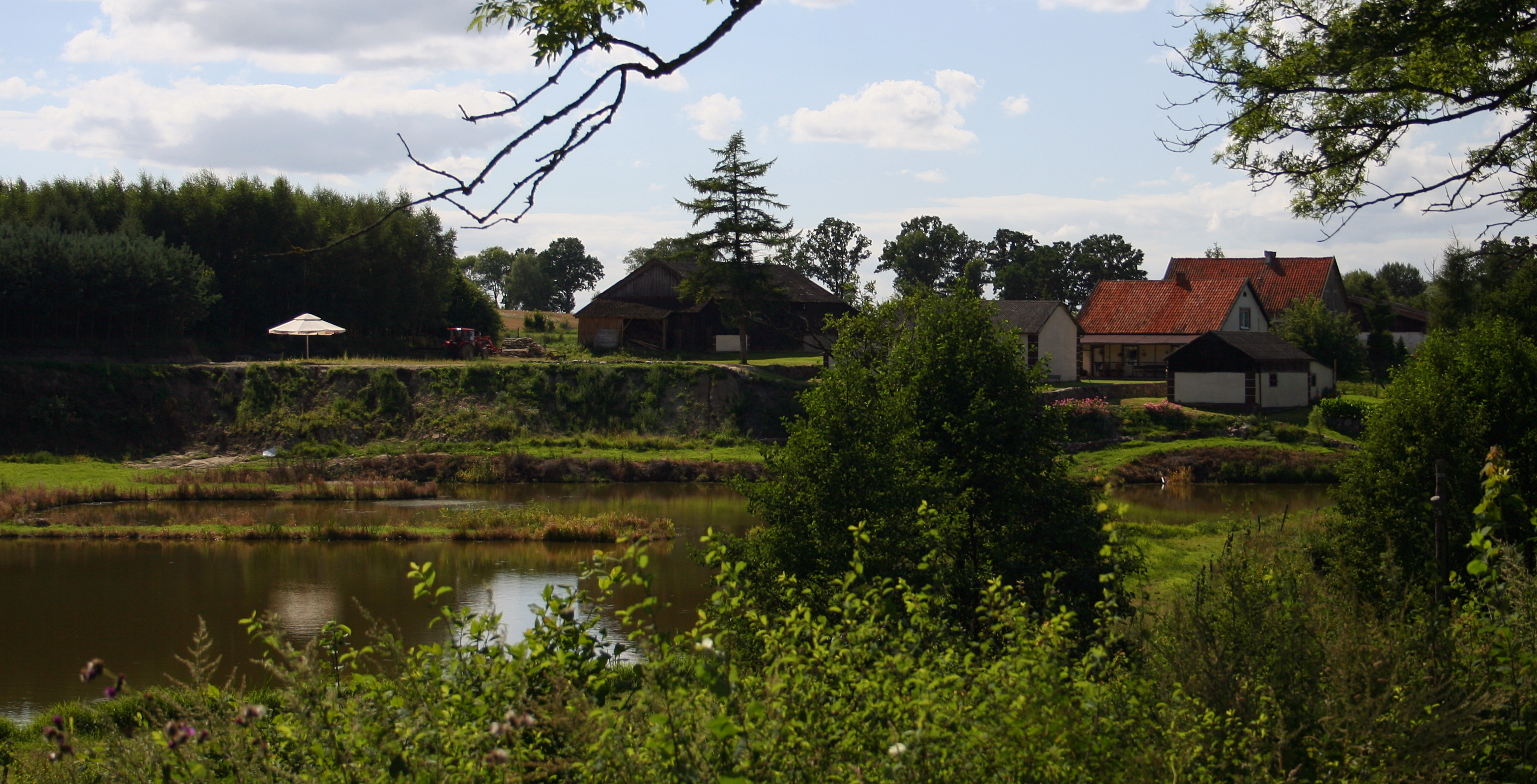 Fragment miejscowości Osetnik, widok od strony północno-wschodniej